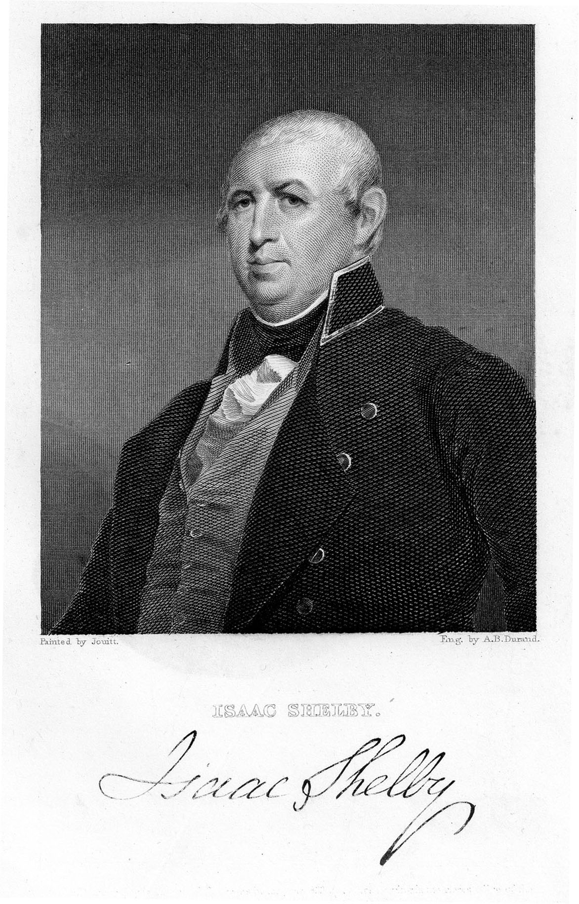 Isaac Shelby, Erster Gouverneur Kentucky